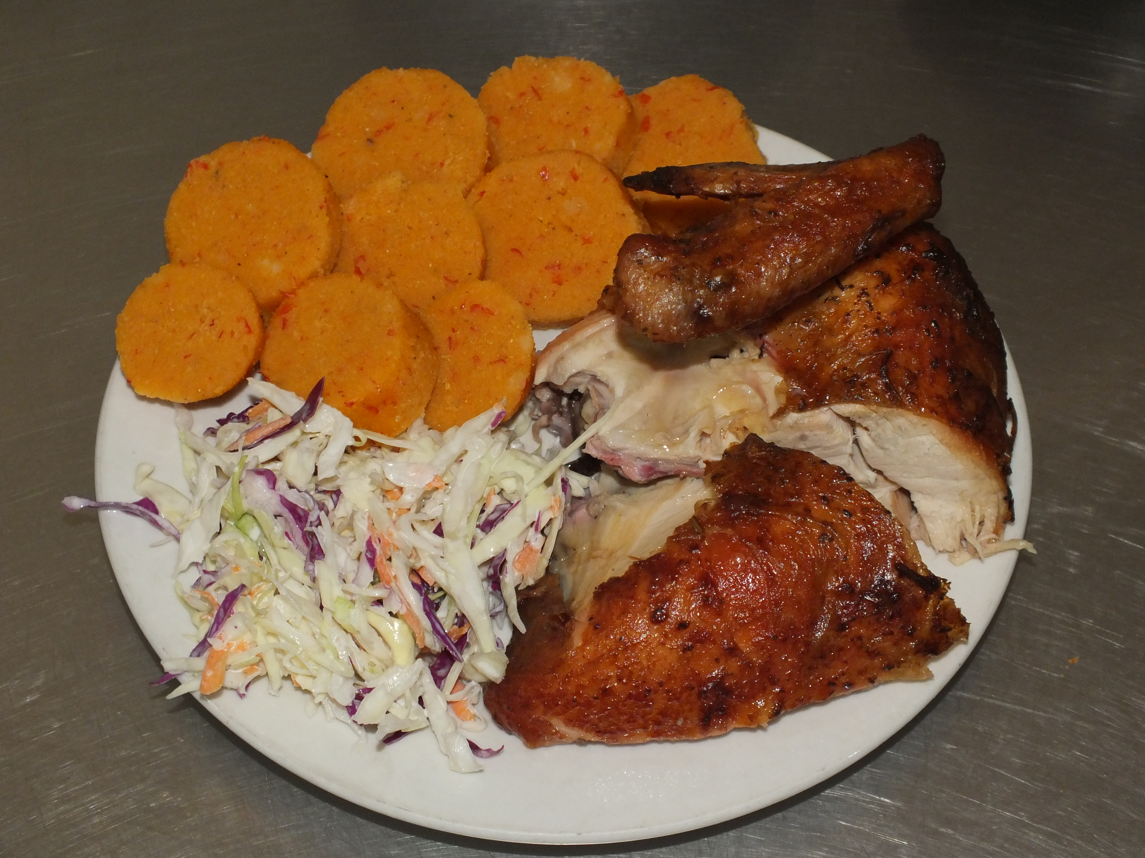 Plato de la region Llanera